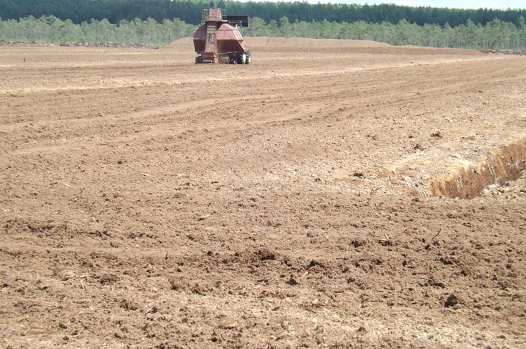 Гальский мох